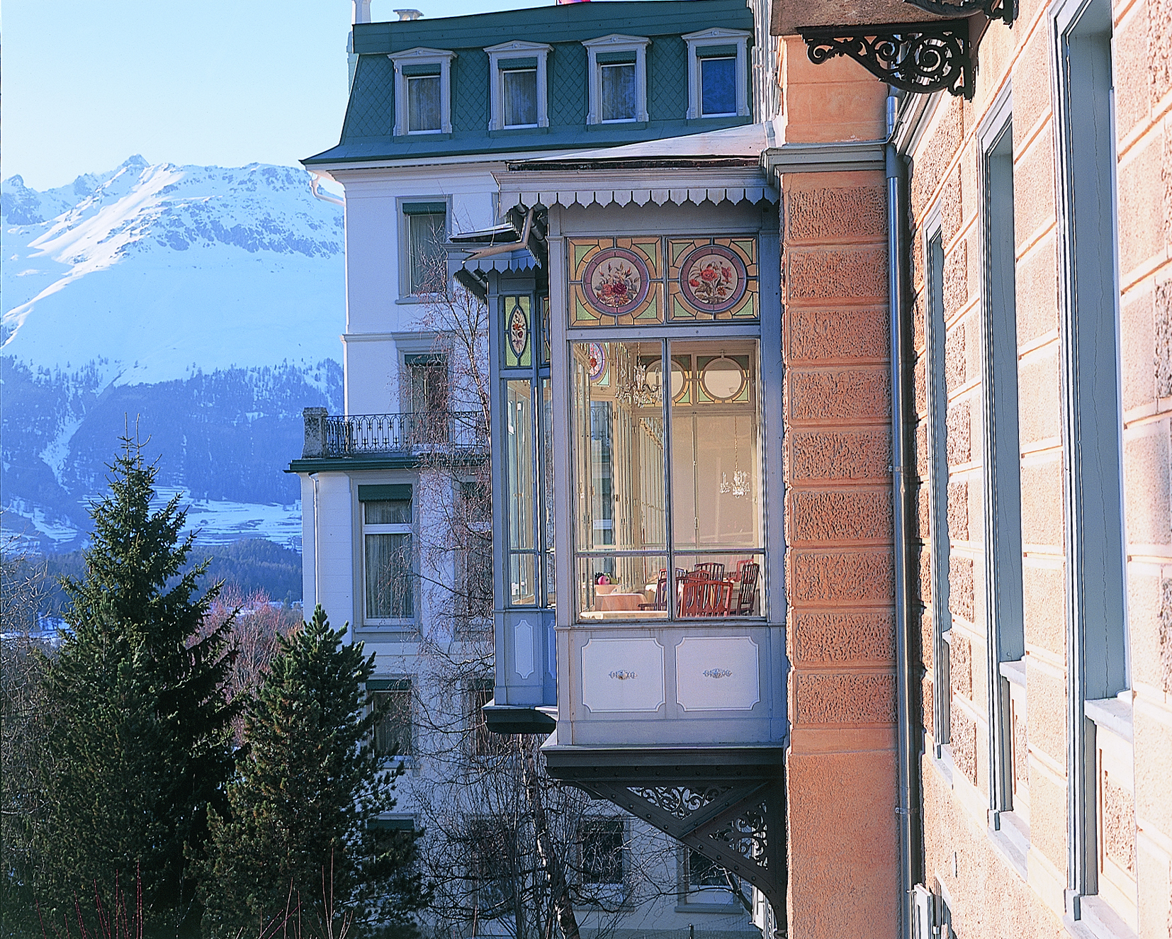 Veranda des Restaurants Belle Epoque (15 Gault Millau Punkte)